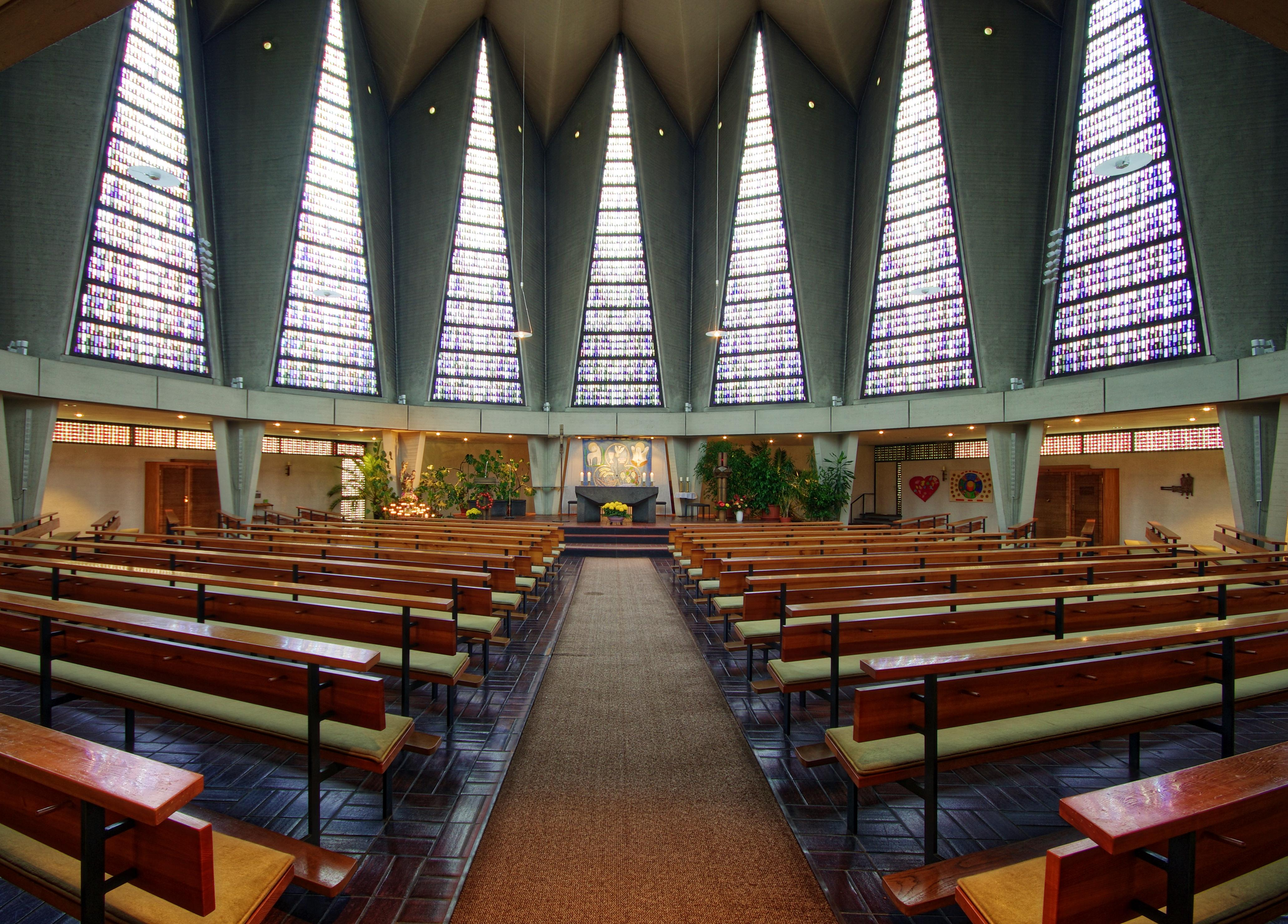 Innenraum von St. Albert